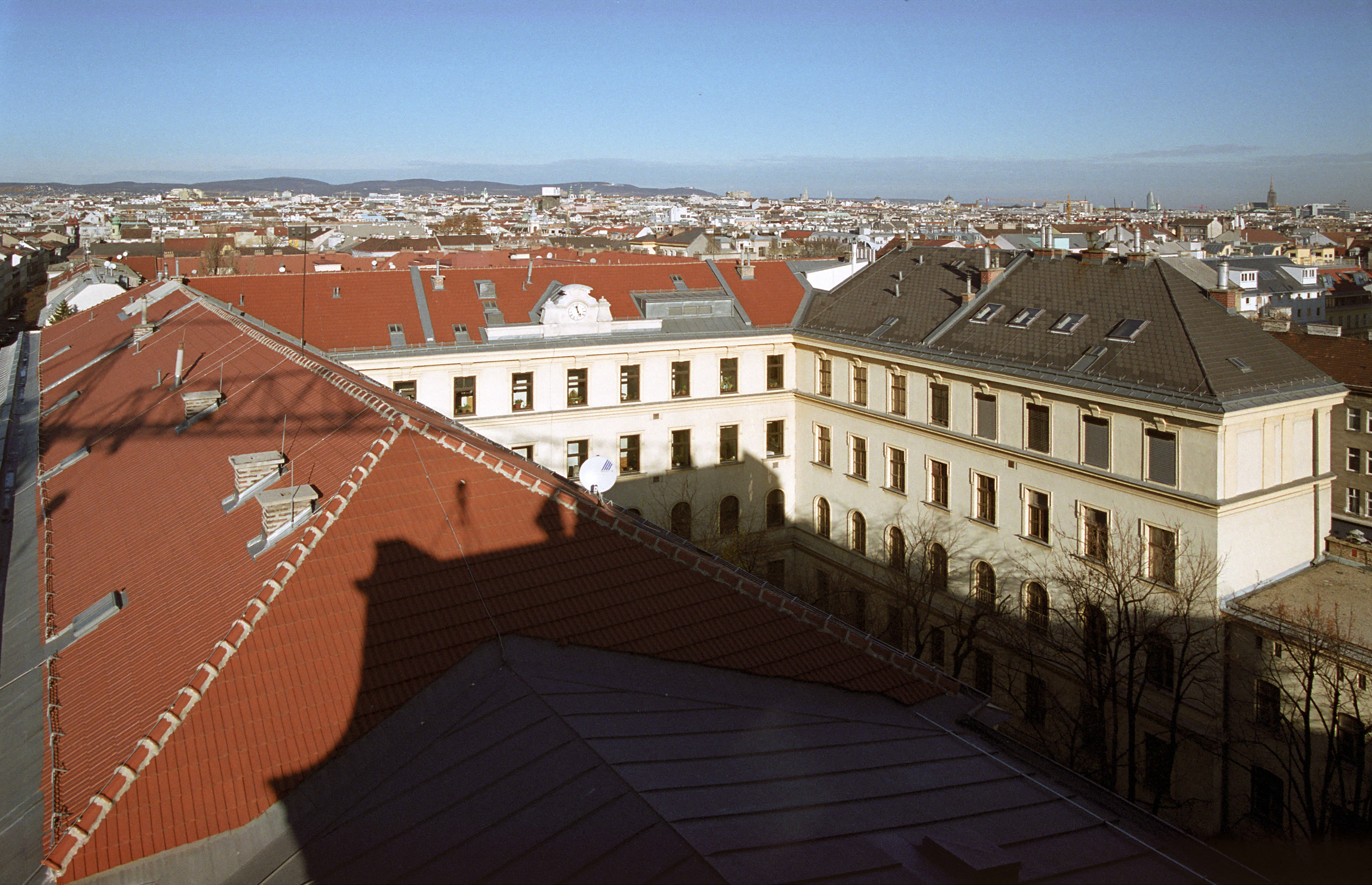 A-Gebäude der HTL Spengergasse mit Blick Richtung Kahlenberg